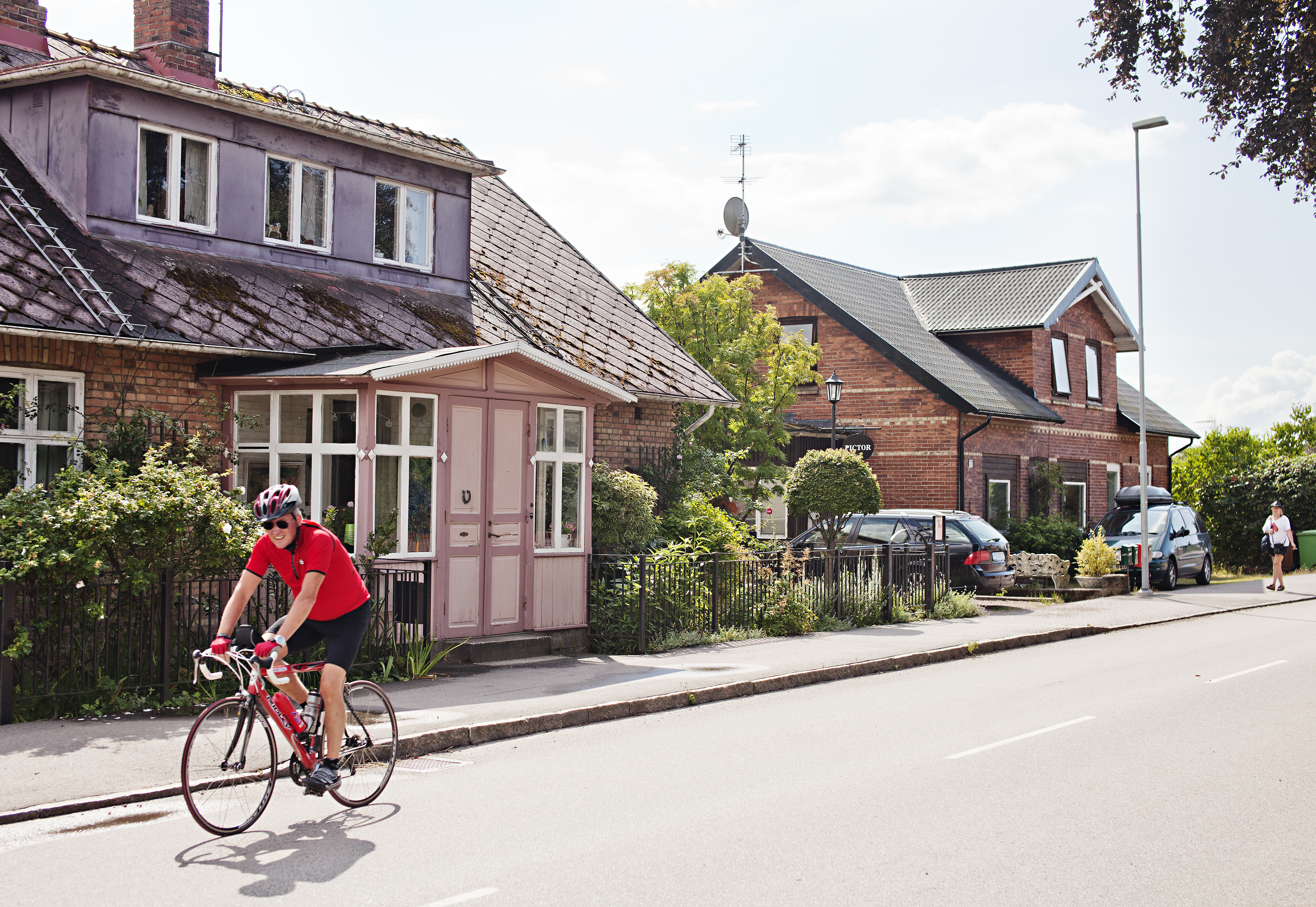 Cykeltur längs gata i Munka Ljungby.